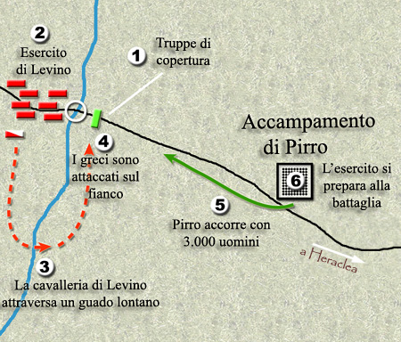 Primer escenario de la batalla de Heraclea, 280 adC. - Foto concedida por el autor a cargo de Maximix